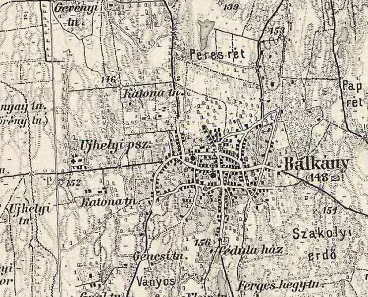 Balkányról készült térkép a harmadik magyarországi katonai felmérés keretében.